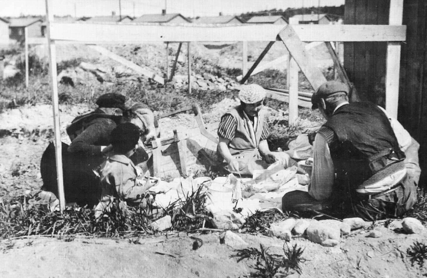 Nybyggarna i Tallkrogen tar en paus